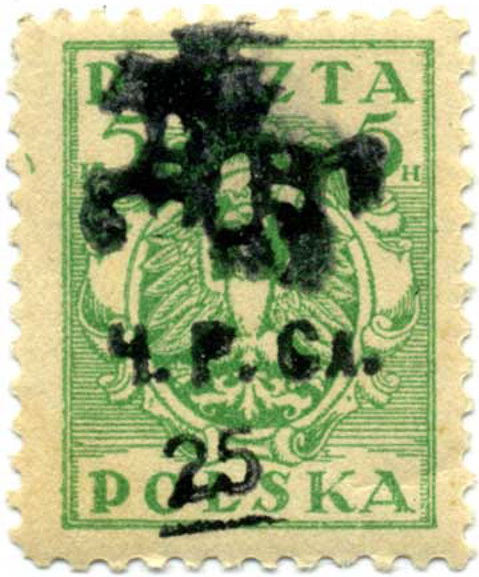 Беларуская (тарашкевіца): Марка Часовай Рады Случчыны вартасьцю 25 грошай